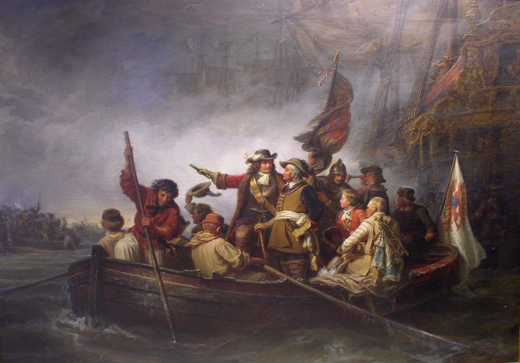 Landung des Großen Kurfürsten auf Rügen, 1678 (zeitgenössisch)